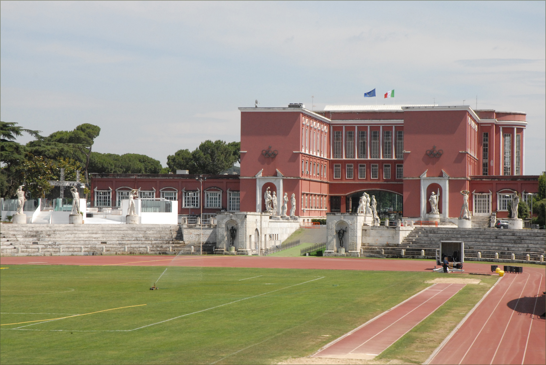 Le stade des marbres et le bâtiment du comité olympique ____________ Le Foro Italico, appelé dans les années 30, Foro Mussolini, est un grand ensemble de bâtiments et d'équipements sportifs. Sa construction a débuté à l'époque fasciste sous la direction de l'architecte Enrico Del Dubbio. Le Foro a été inauguré en 1932. A l'entrée, un obélisque en marbre dédié à Mussolini a été érigé. Le stade des marbres est l'équipement le plus célèbre avec ses 60 statues d'athlètes à l'antique, placées au-dessus des gradins et offertes par les villes et provinces d'Italie. A l'entrée, se trouvait l'Académie d"éducation physique, constituée de deux corps de bâtiments rouges, symétriques et reliés par une loggia. Les locaux sont occupés aujourd'hui par le comité olympique italien. A proximité, un stade olympique a été construit pour les jeux de 1960 puis agrandi pour la coupe du monde de 1990.